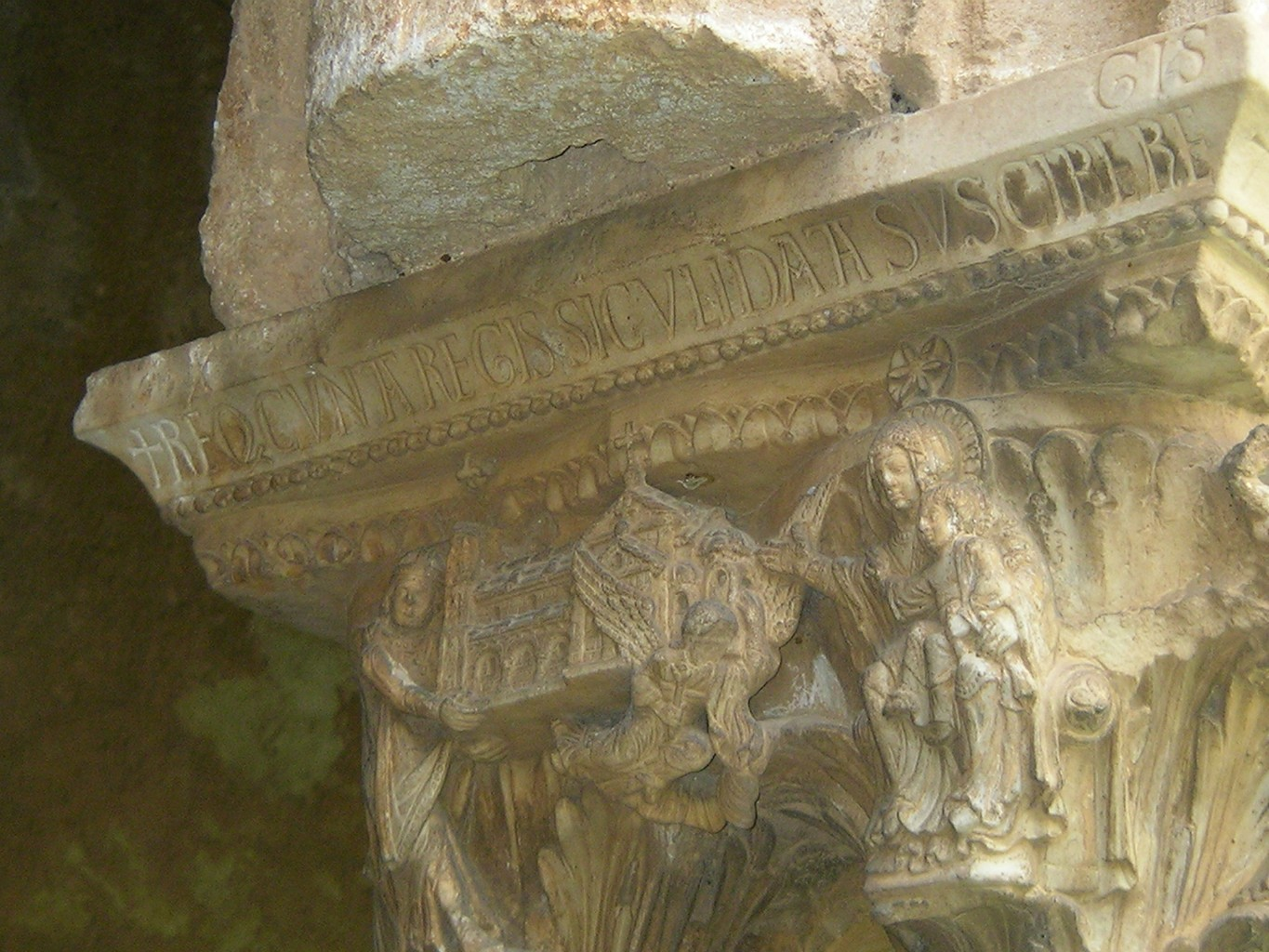 Chiostro di Monreale, dedicazione della chiesa - Übergabe der Kirche an die Gottesmutter